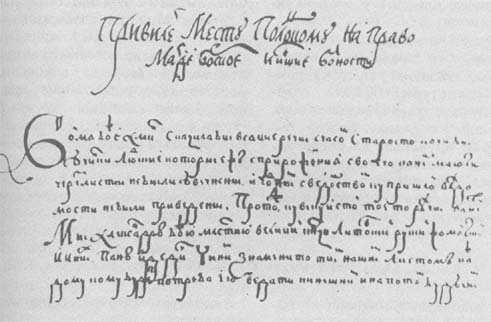 Фрагмент прывiлея Полацку на магдэбургскае права